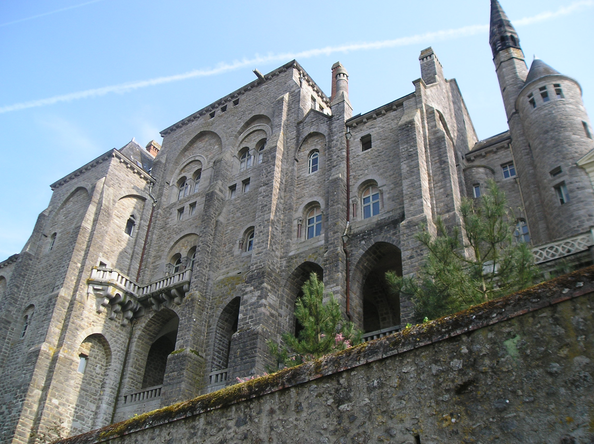 Vue de l'abbaye depuis le chemin situé au pied des remparts.